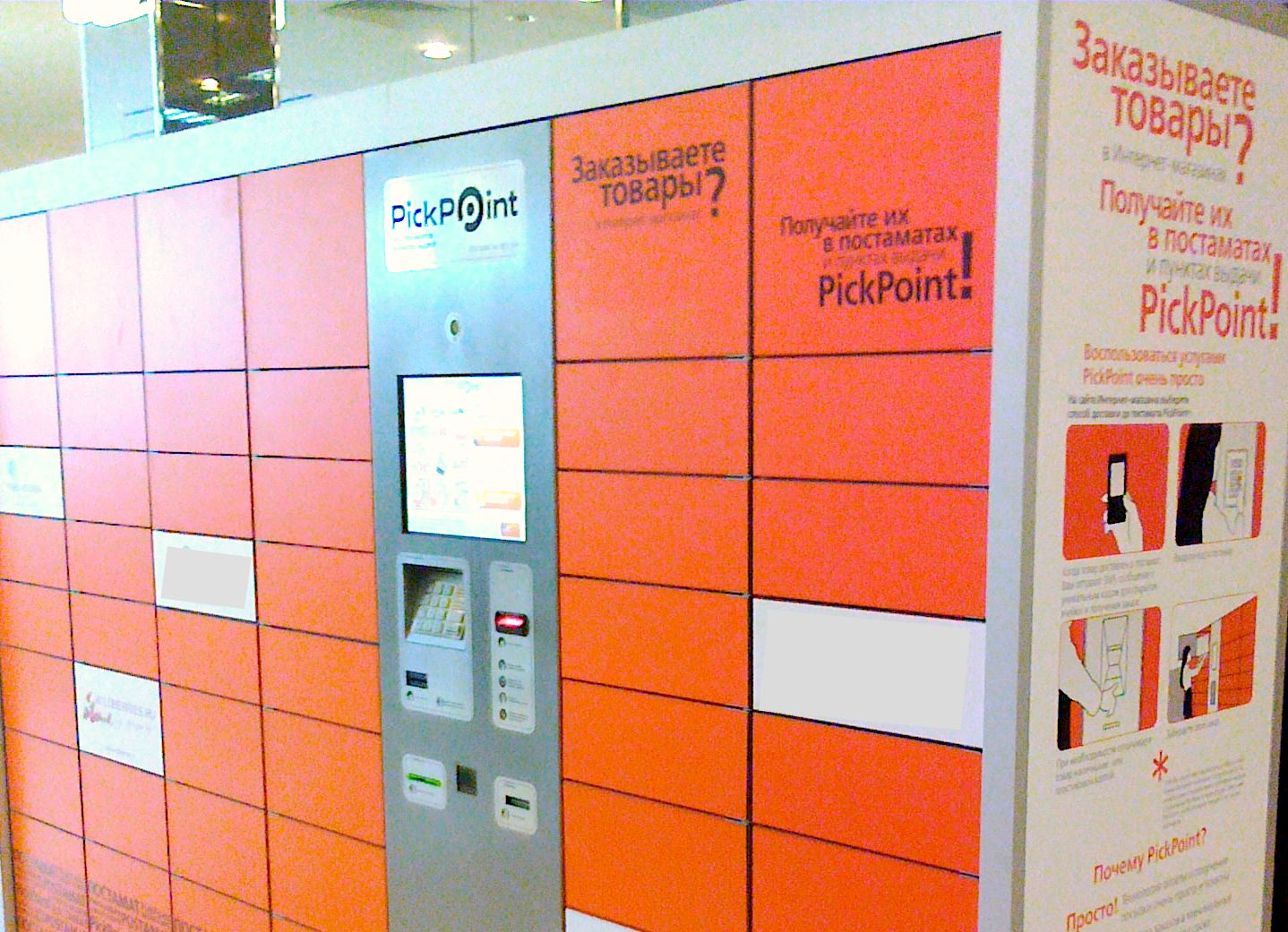 Как выглядить Постамат